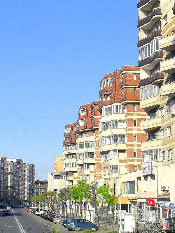 Baia Mare